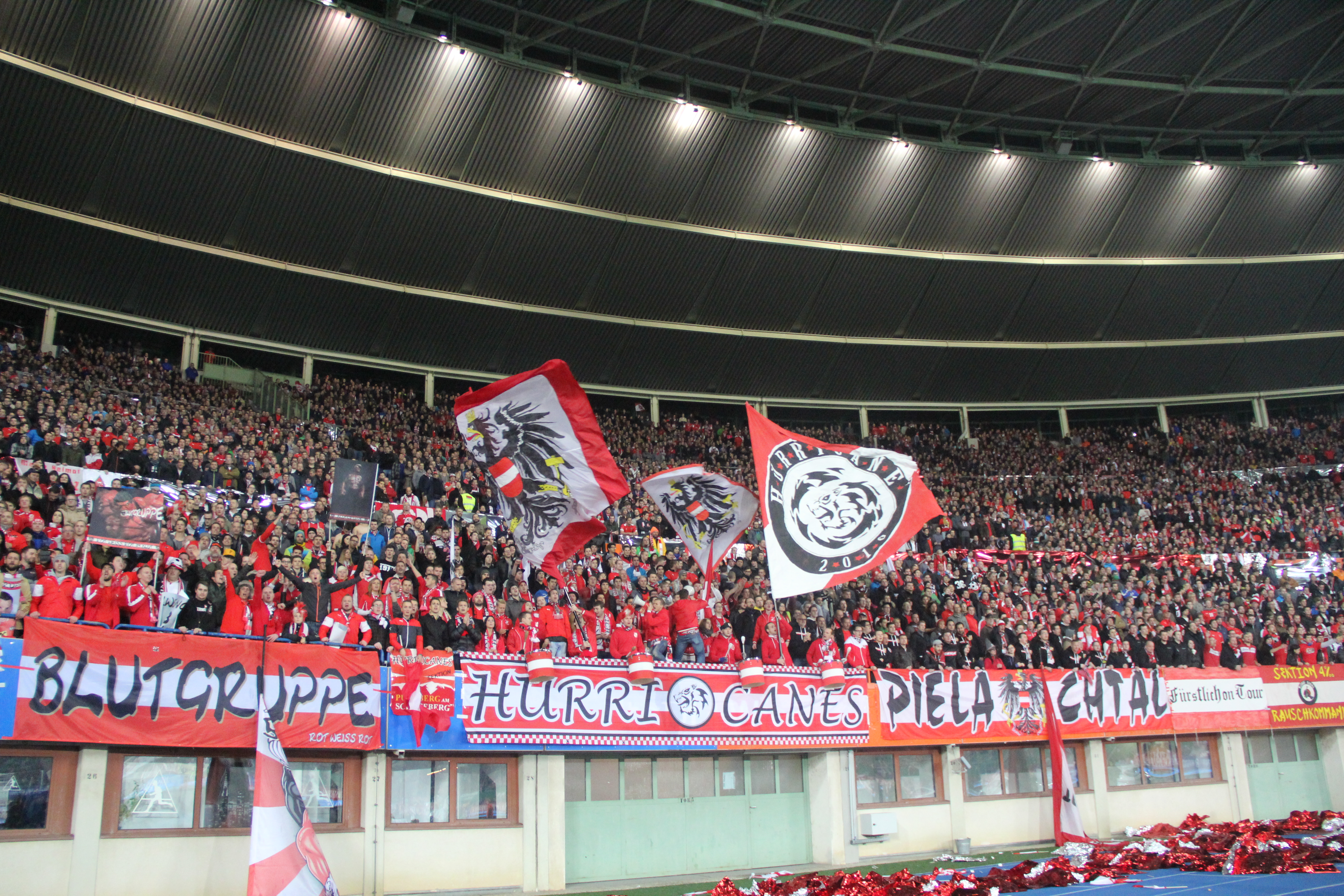 Fankurve österreichisches Nationalteam bei Österreich-Russland, 15.11.2014